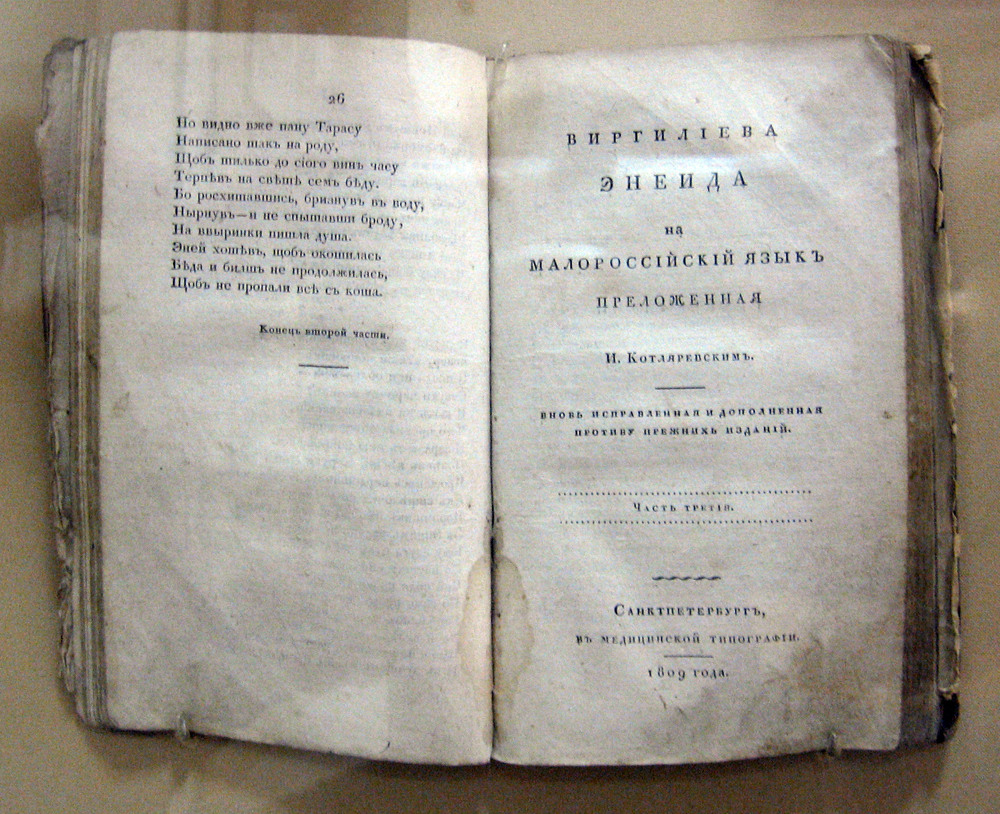 Виргилиева Энеида, переложенная на малороссийский язык И.Котляревским, СПб, 1809